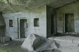 Una de las construcciones subterráneas del templo de la Luna en Huayna Picchu